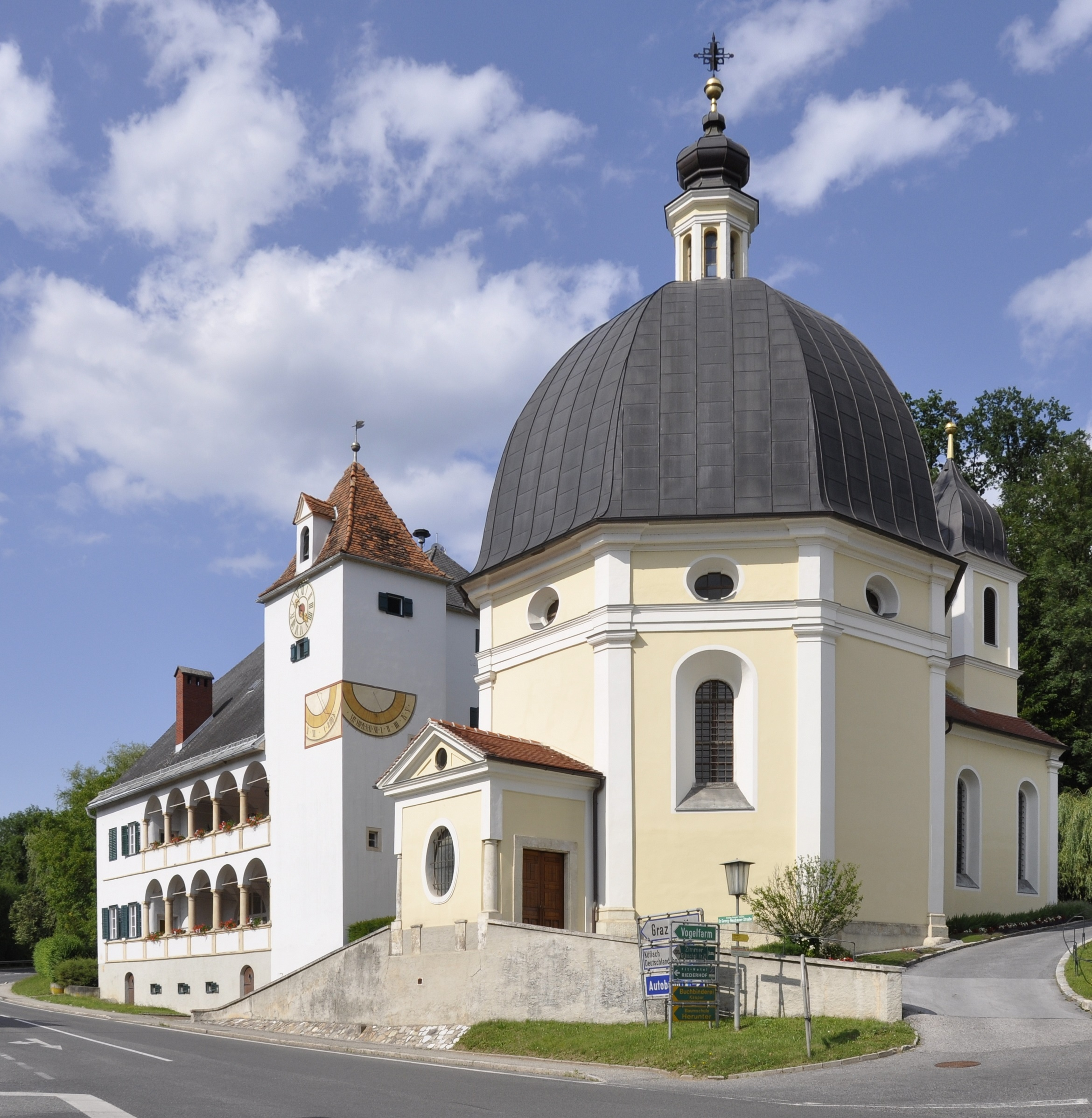 Kath. Pfarrkirche Unbefleckte Empfängnis, links dahinter befindet sich der Pfarrhof